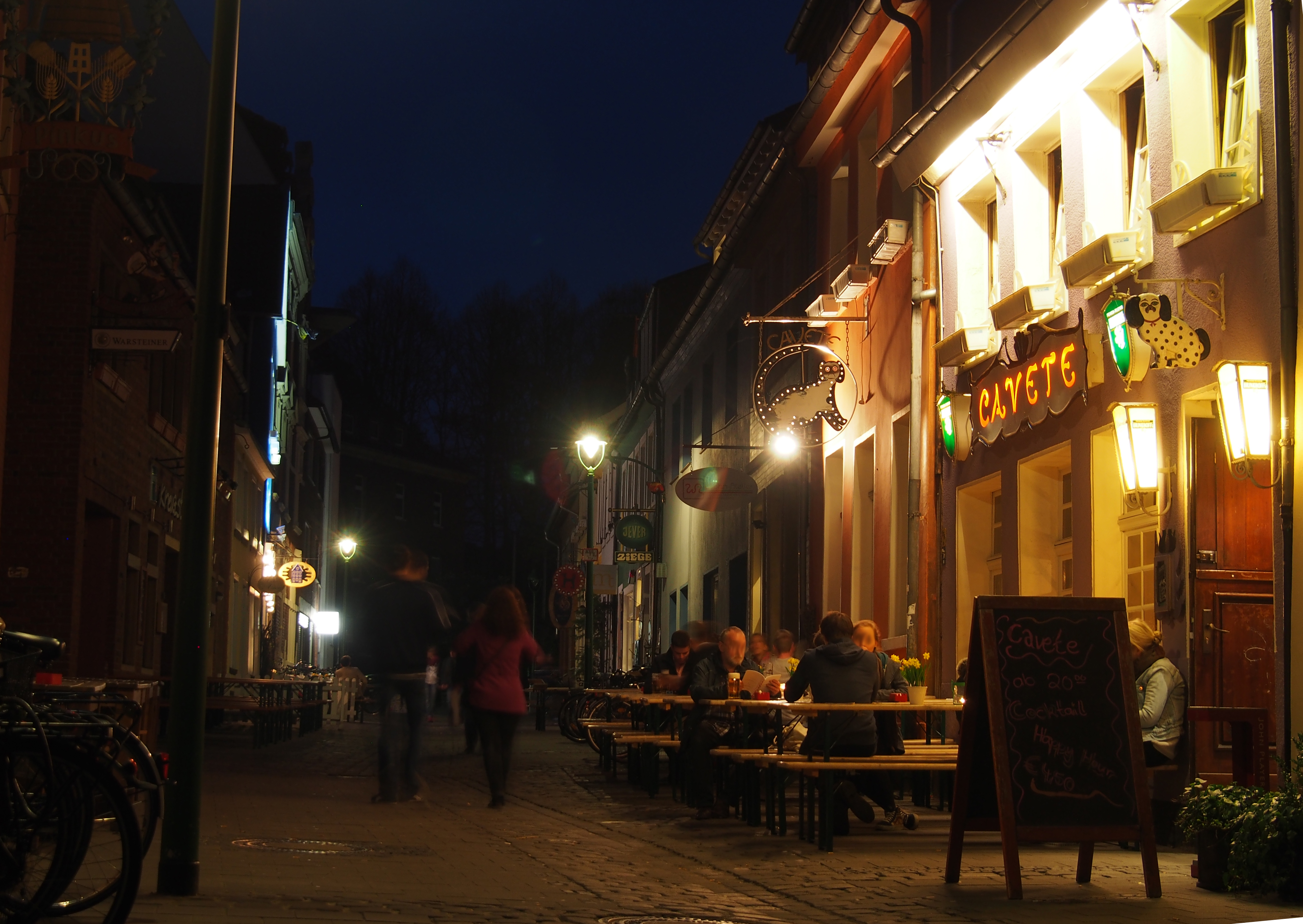 Gaststätte Cavete in Münster (Westfalen), Kreuzstraße im Kuhviertel